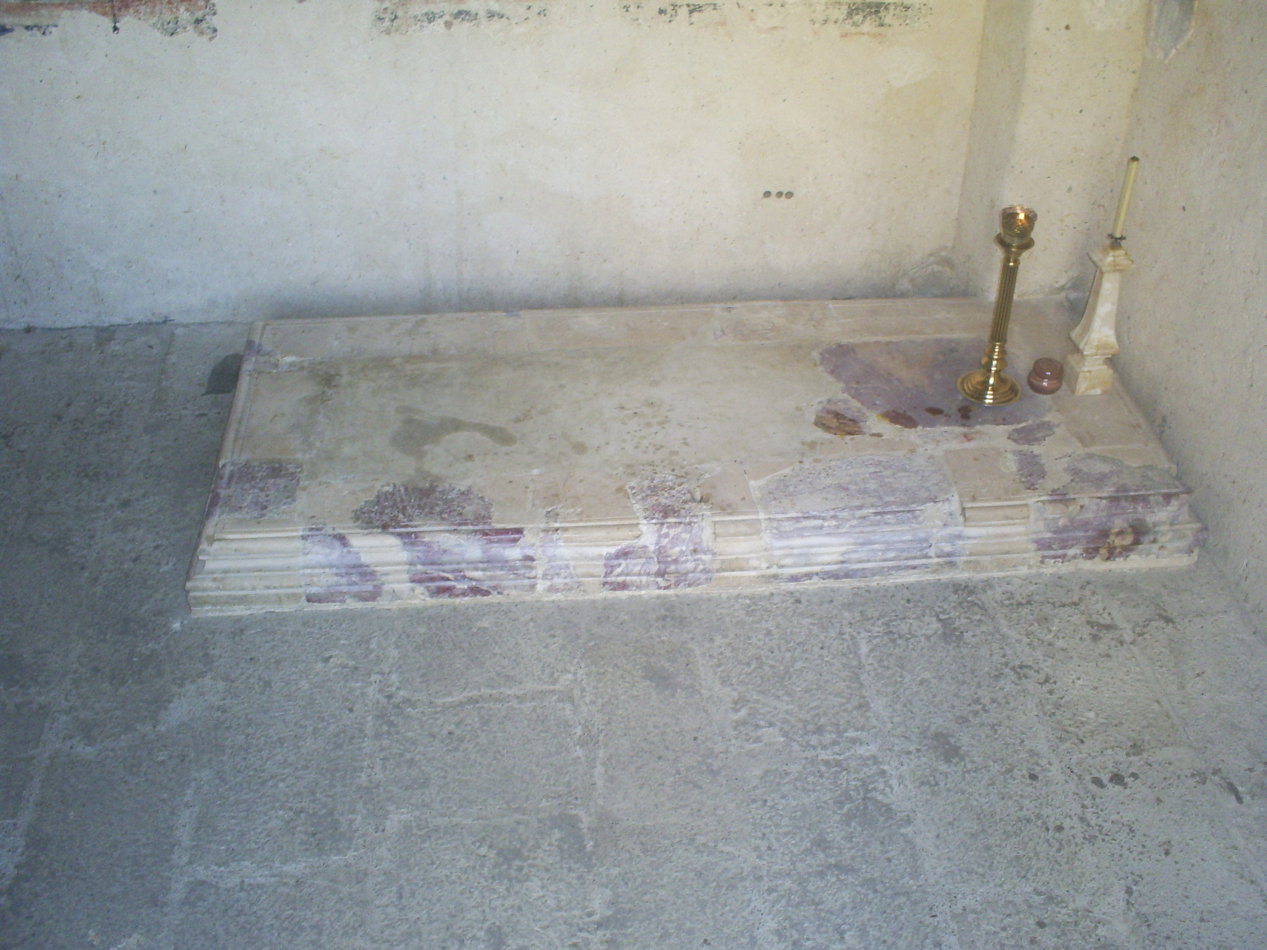 Grob kralja Dragutina - Manastir Djurdjevi stupovi